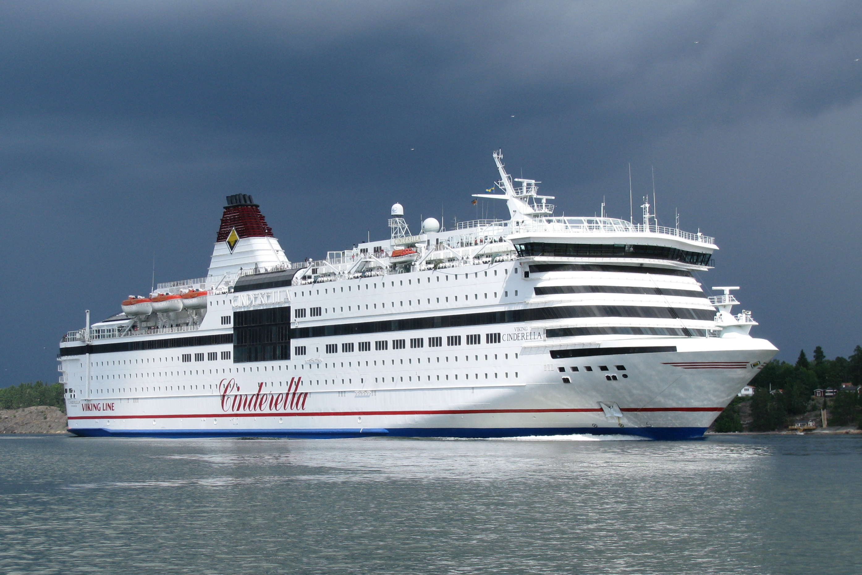 Viking lines Cinderella i Stockholms skärgård mellan Solöfjärden och Torsbyfjärden Källa: eget foto, fotograf EnDumEn 4 juli 2009.